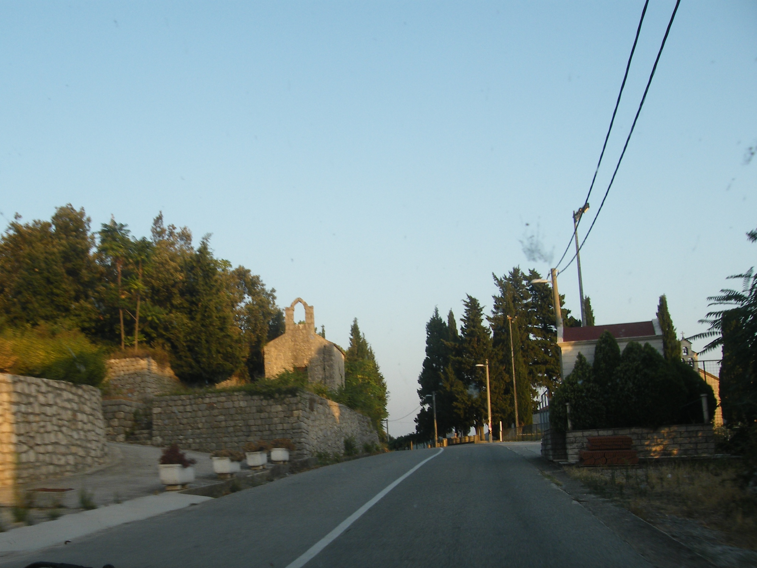 Potomje